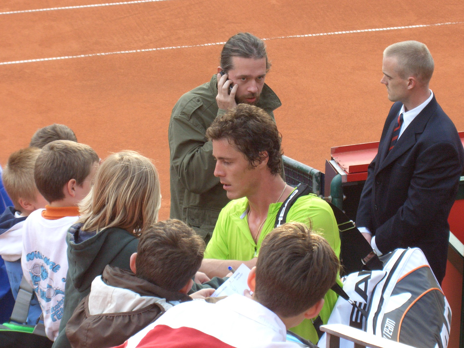 Марат Сафин раздава автографи след победата си над Николас Масу в първия кръг на Хамбург Мастърс Автор: HSV Дата: 14.05.2007